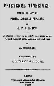 Prietenul tinerimei traduit par George Radu Melidon